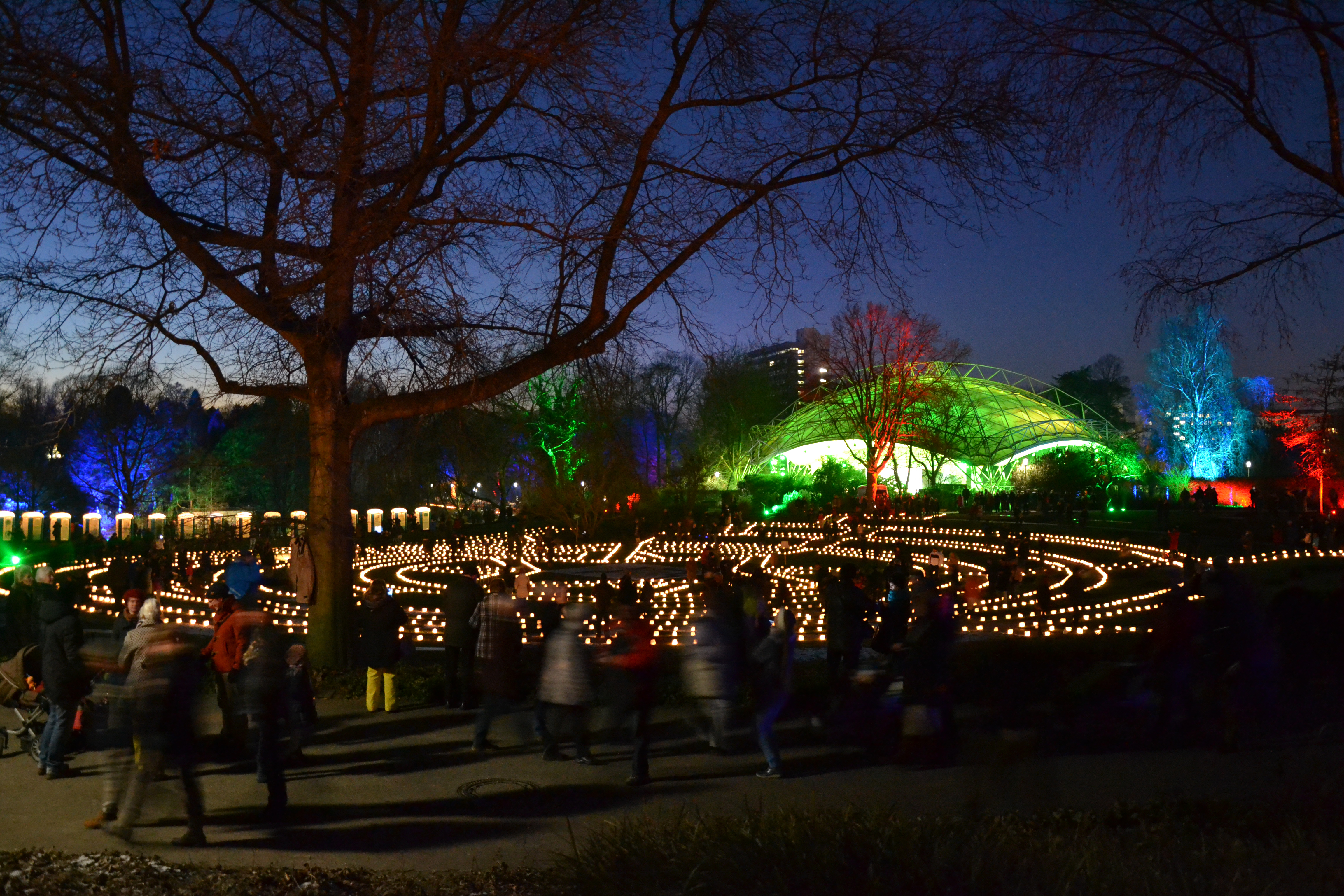 Eröffnung der Grünen Hauptstadt Europas, Essen 2017 im Grugapark